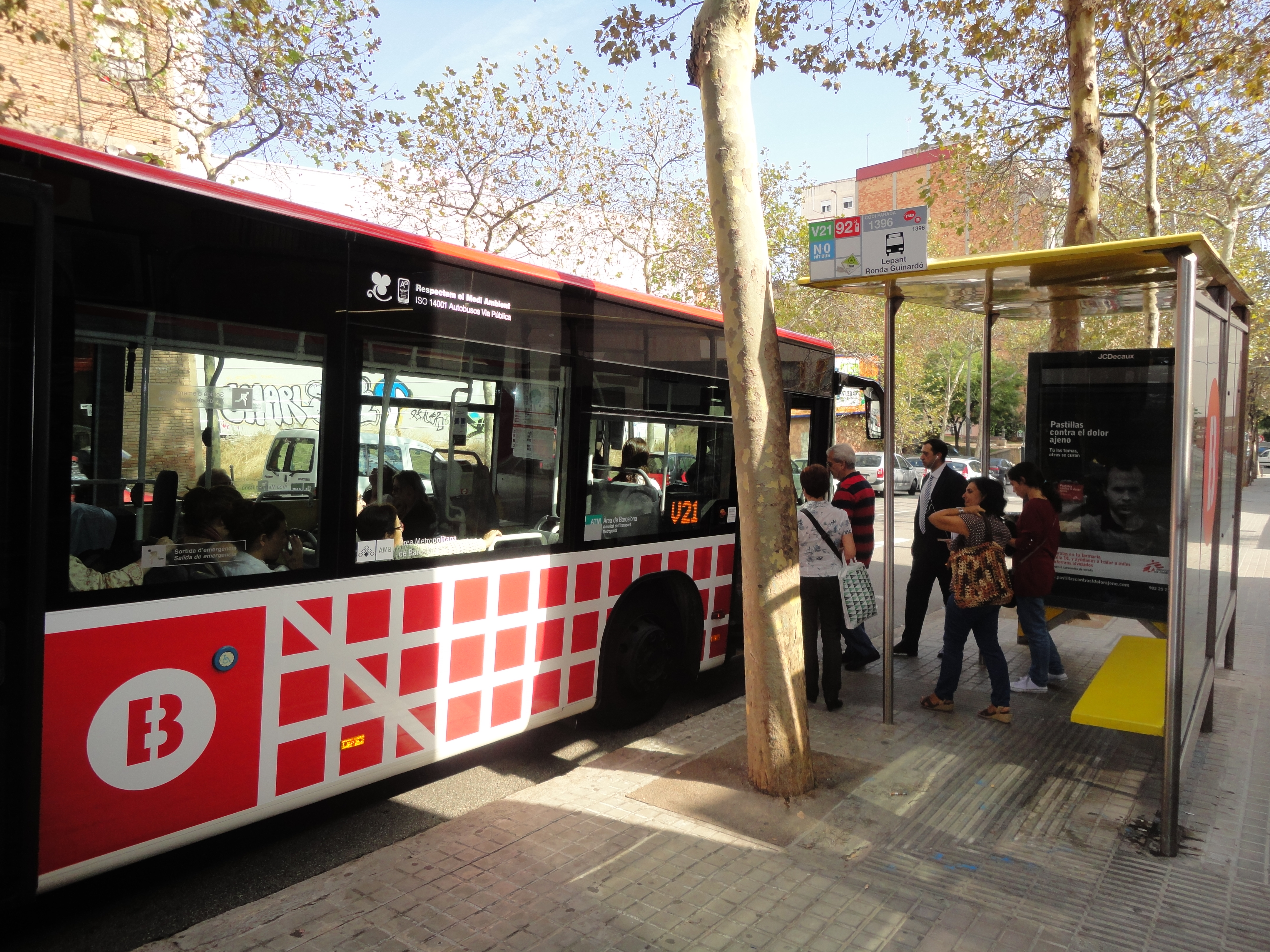 Autobús de Barcelona